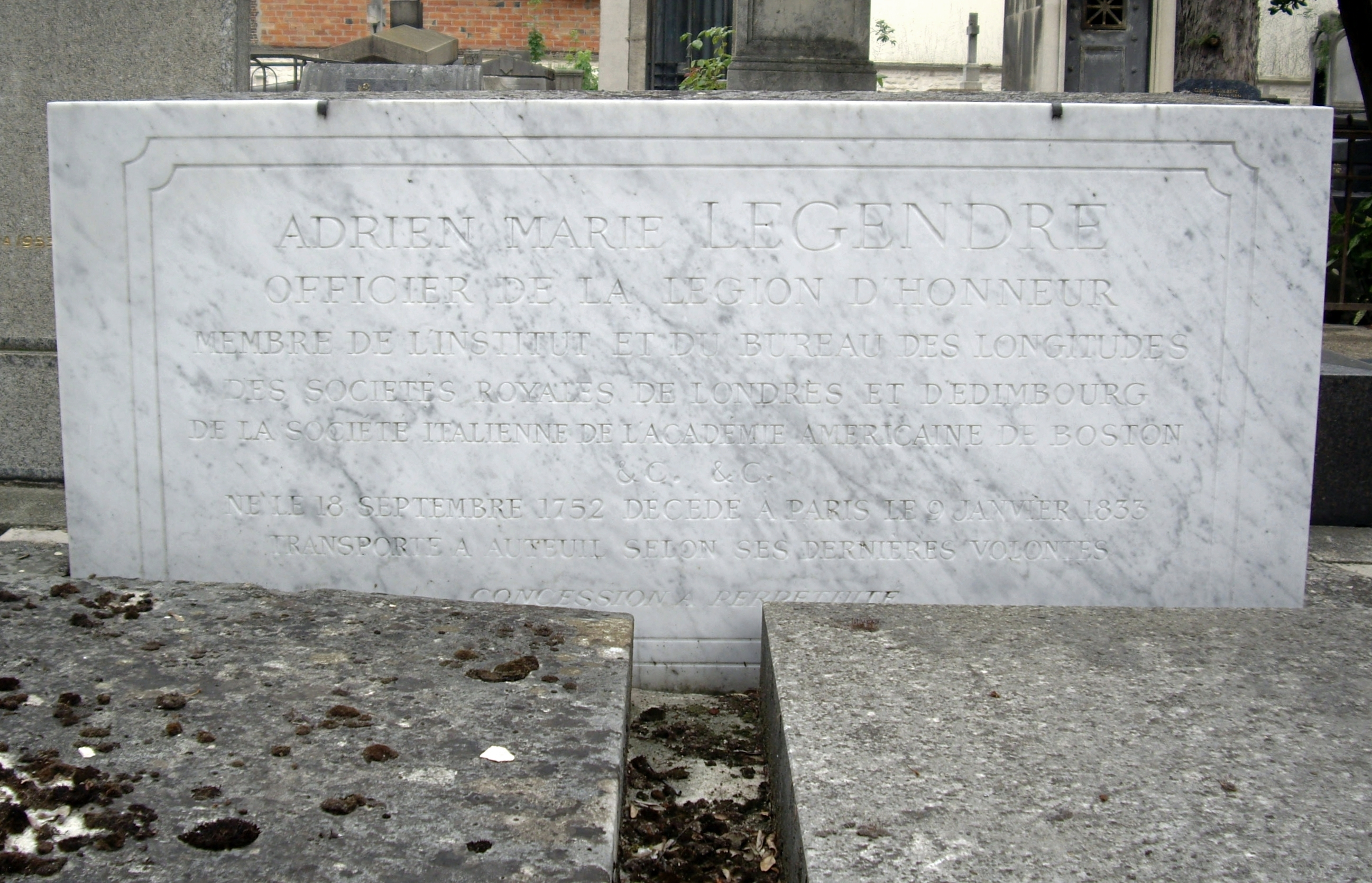 Tombe d'Adrien-Marie Legendre, cimetière d'Auteuil, division 5.